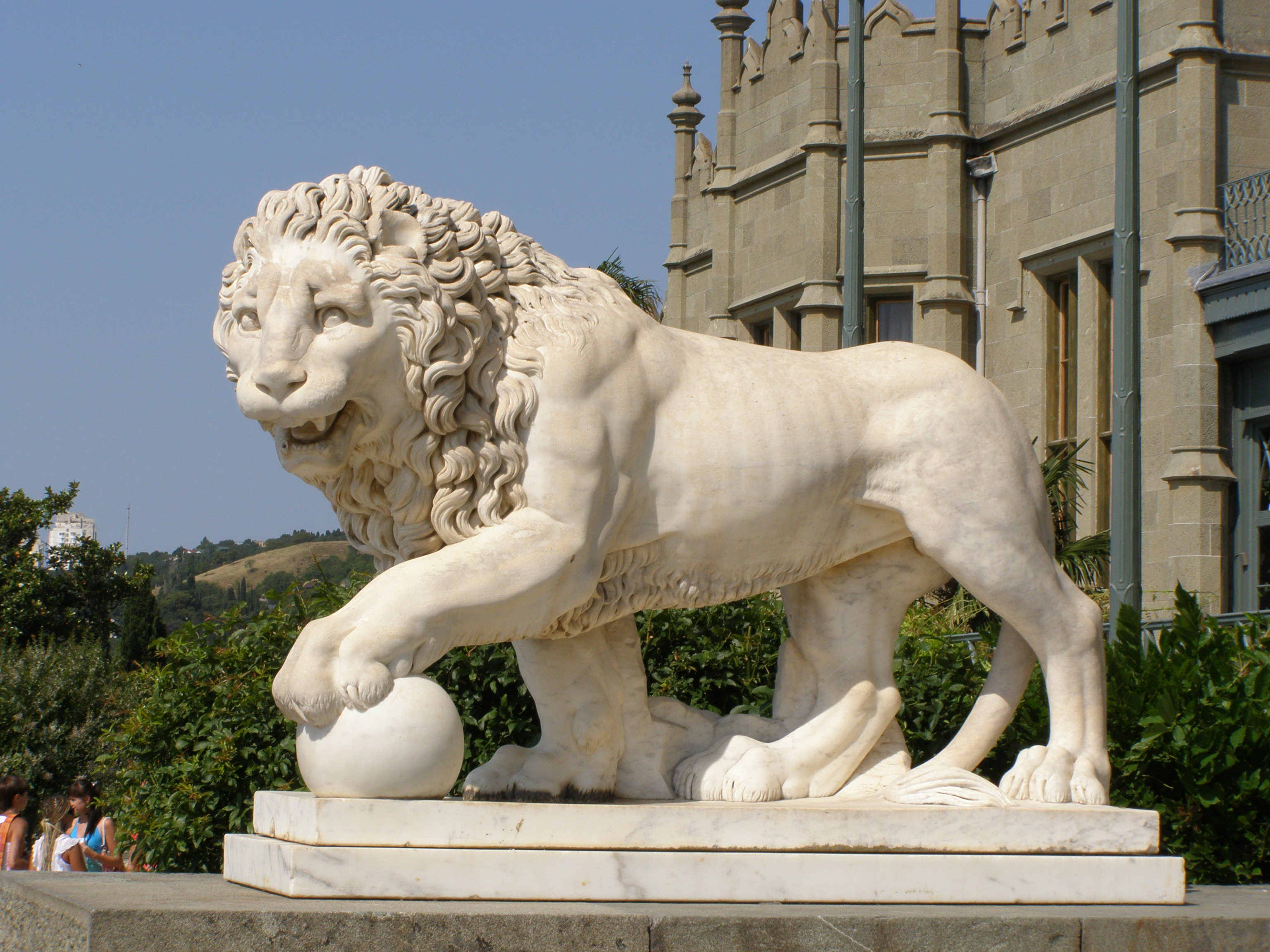 Мраморный лев в Воронцовском Дворце